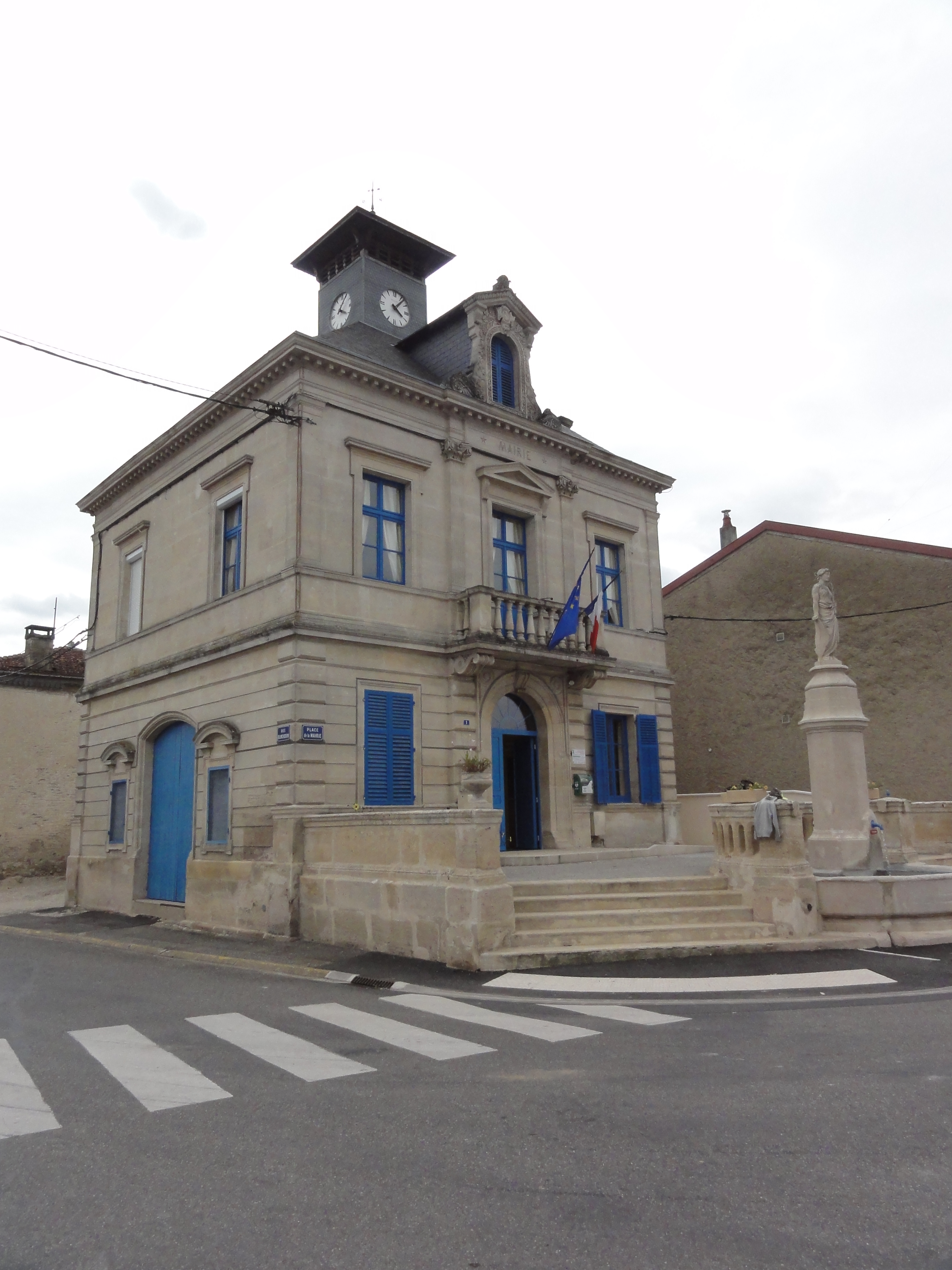 Neuville-sur-Ornain (Meuse) mairie